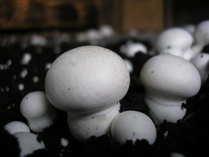 Выращивание шампиньонов